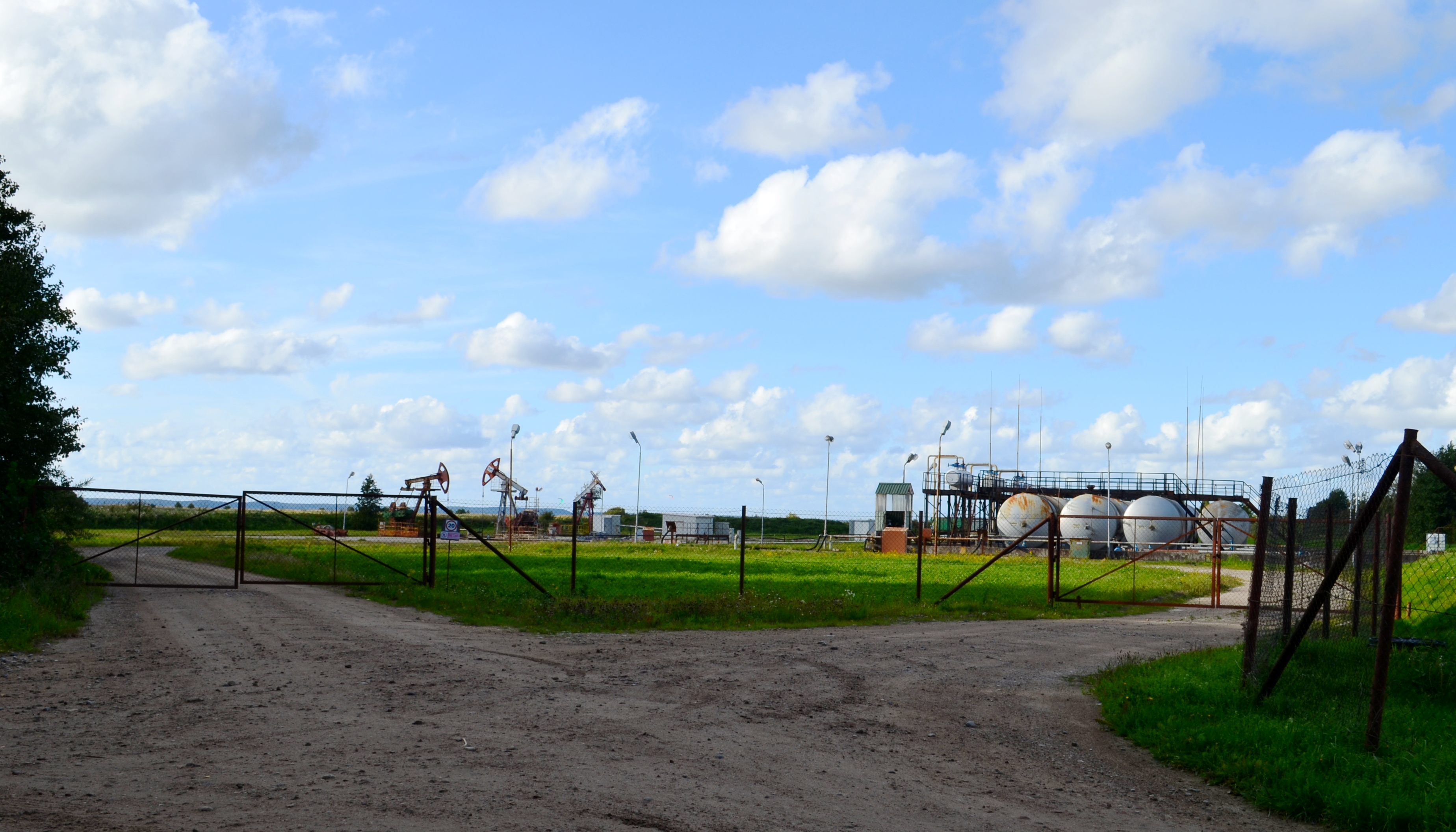 Svencelės naftos telkinys, Klaipėdos raj.